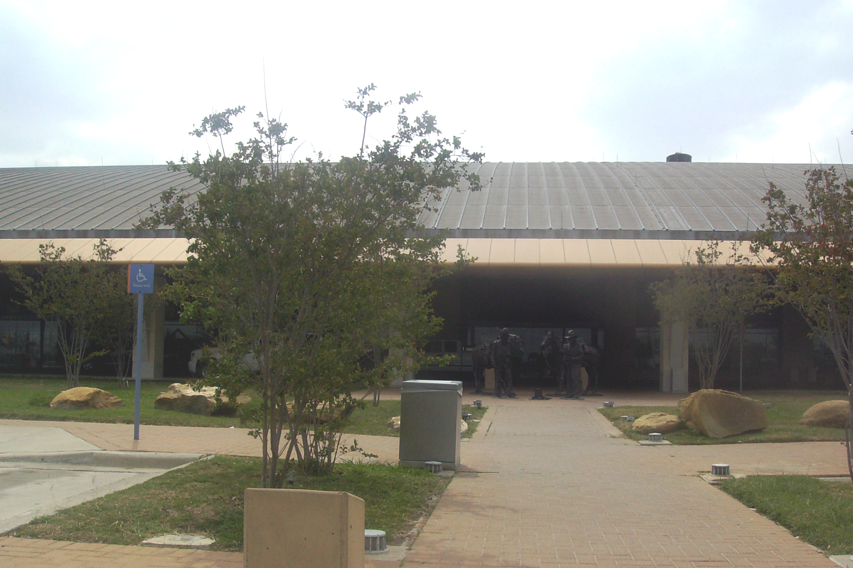 KLRD Entrance